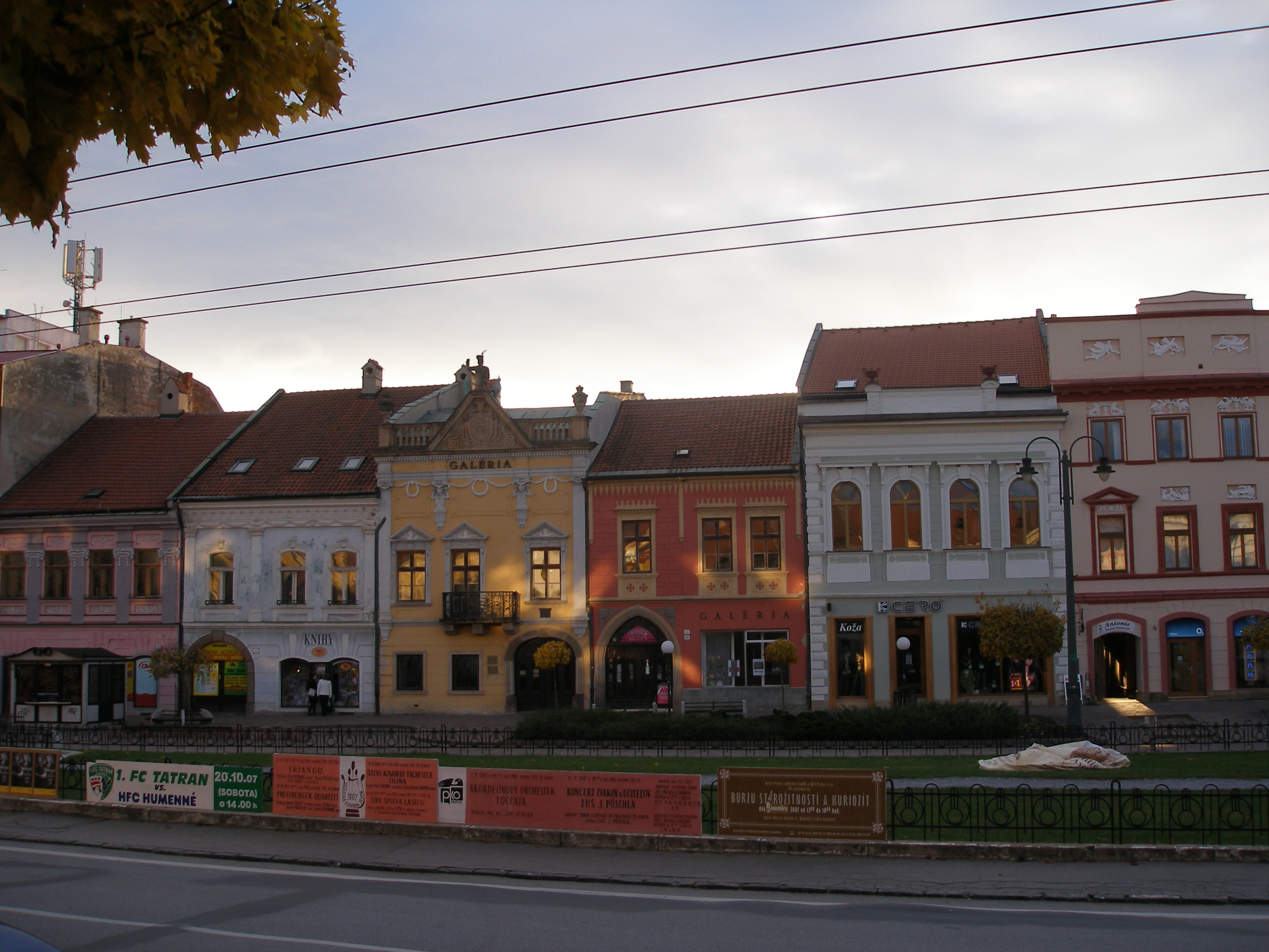 Jesenná nálada v historickom jadre mesta Prešov rok 2007